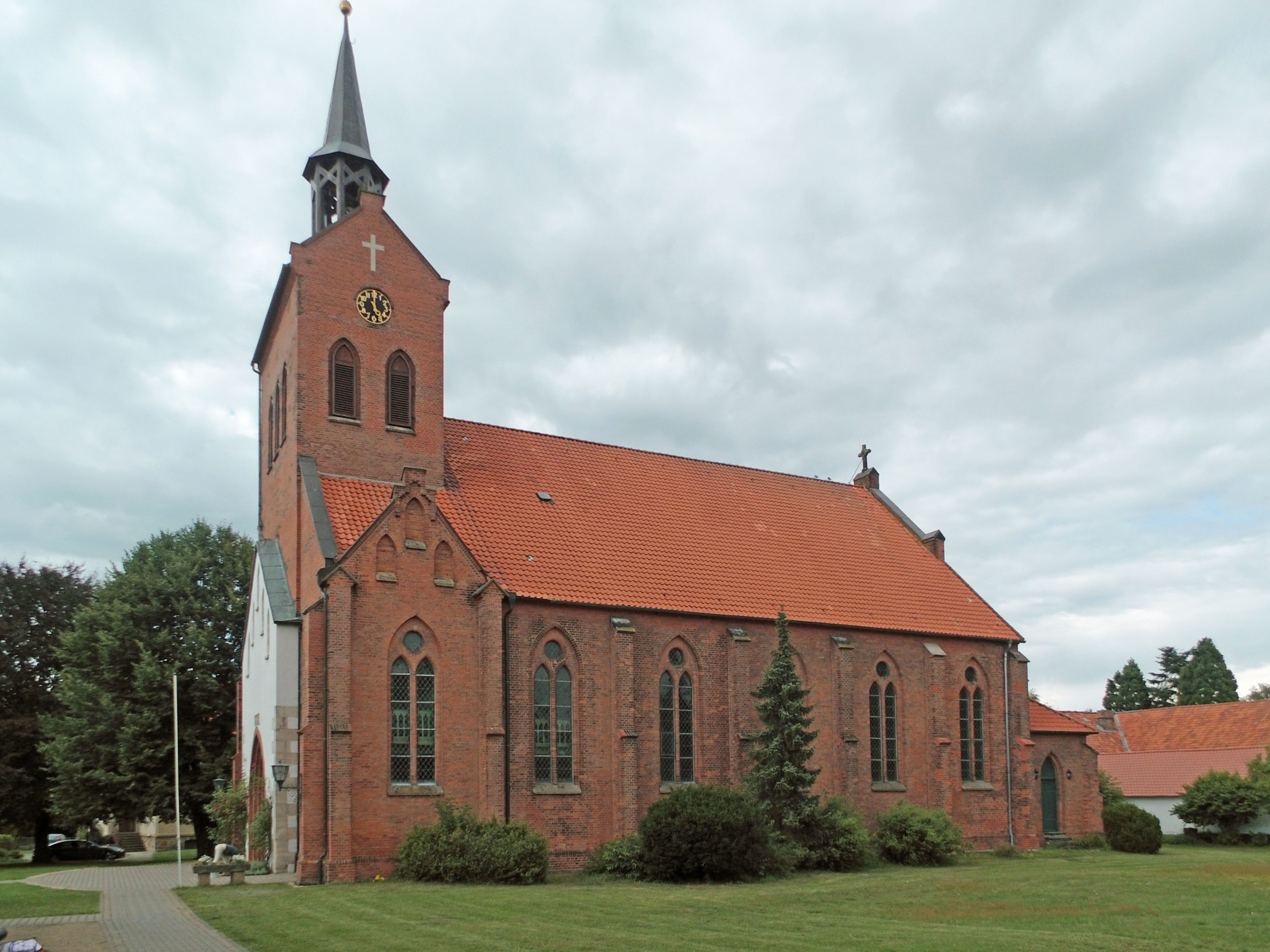 Evangelisch-lutherische St.-Viti-Kirche in Leiferde (Landkreis Gifhorn)